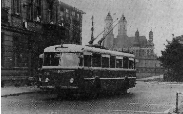 Skoda 8Tr na Rynku Śródeckim (1961)